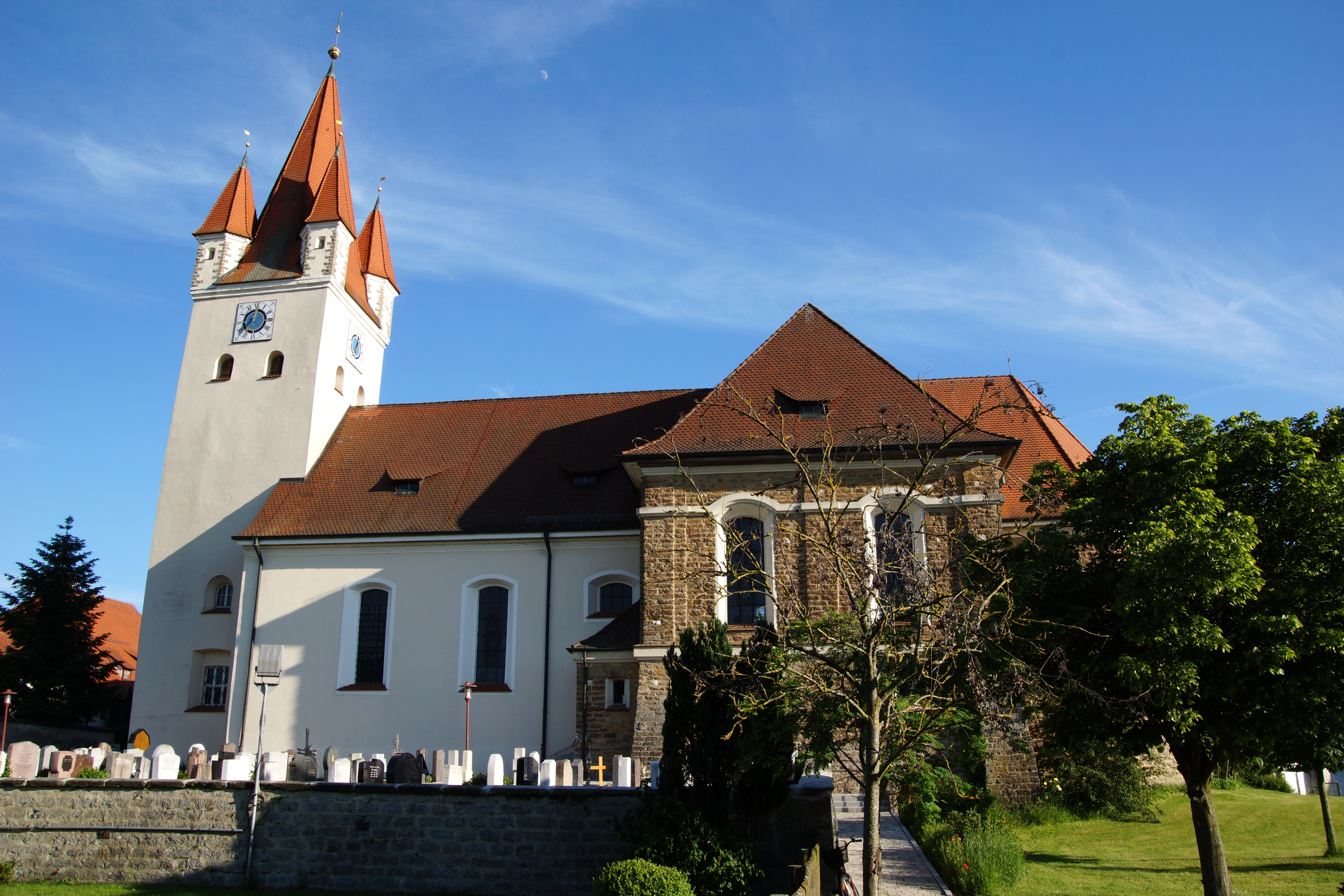 Die katholische Pfarrkirche St. Vitus in Berg bei Neumarkt